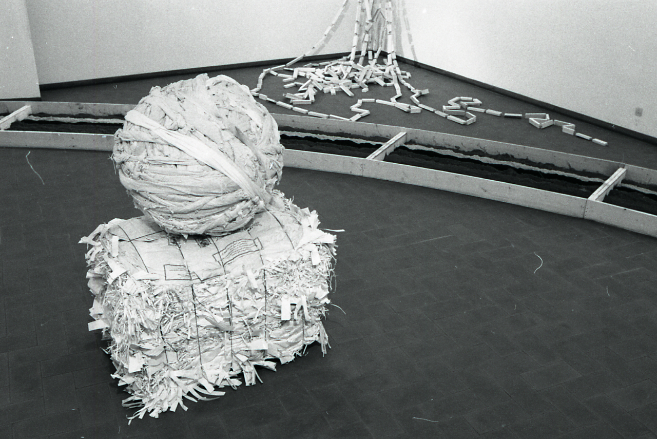 Servizio fotografico : Bologna, 1970 / Paolo Monti. - Strisce: 7, Fotogrammi complessivi: 32 : Negativo b/n, gelatina bromuro d'argento/ pellicola ; 35 mm. - ((I fotogrammi hanno una doppia numerazione. . - Sul portanegativi: Nikormat HP4. - Occasione: Documentazione della mostra di Mario Ceroli presso la Galleria dè Foscherari a Bologna. - Fonte: Fattura di Paolo Monti: IV. Commesse/ Fattura (1970/06/10), presso Archivio Paolo Monti